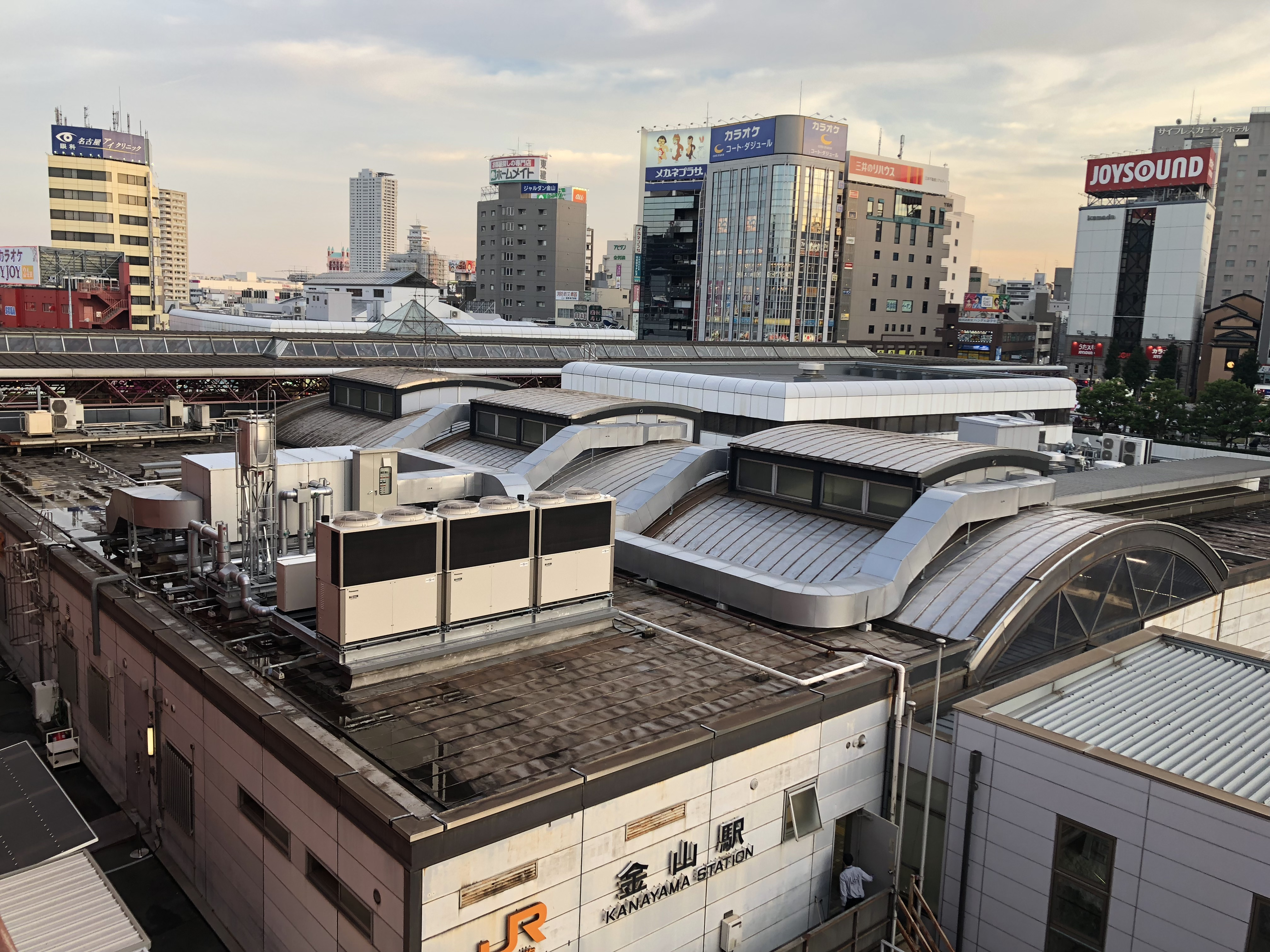 金山駅から南方面